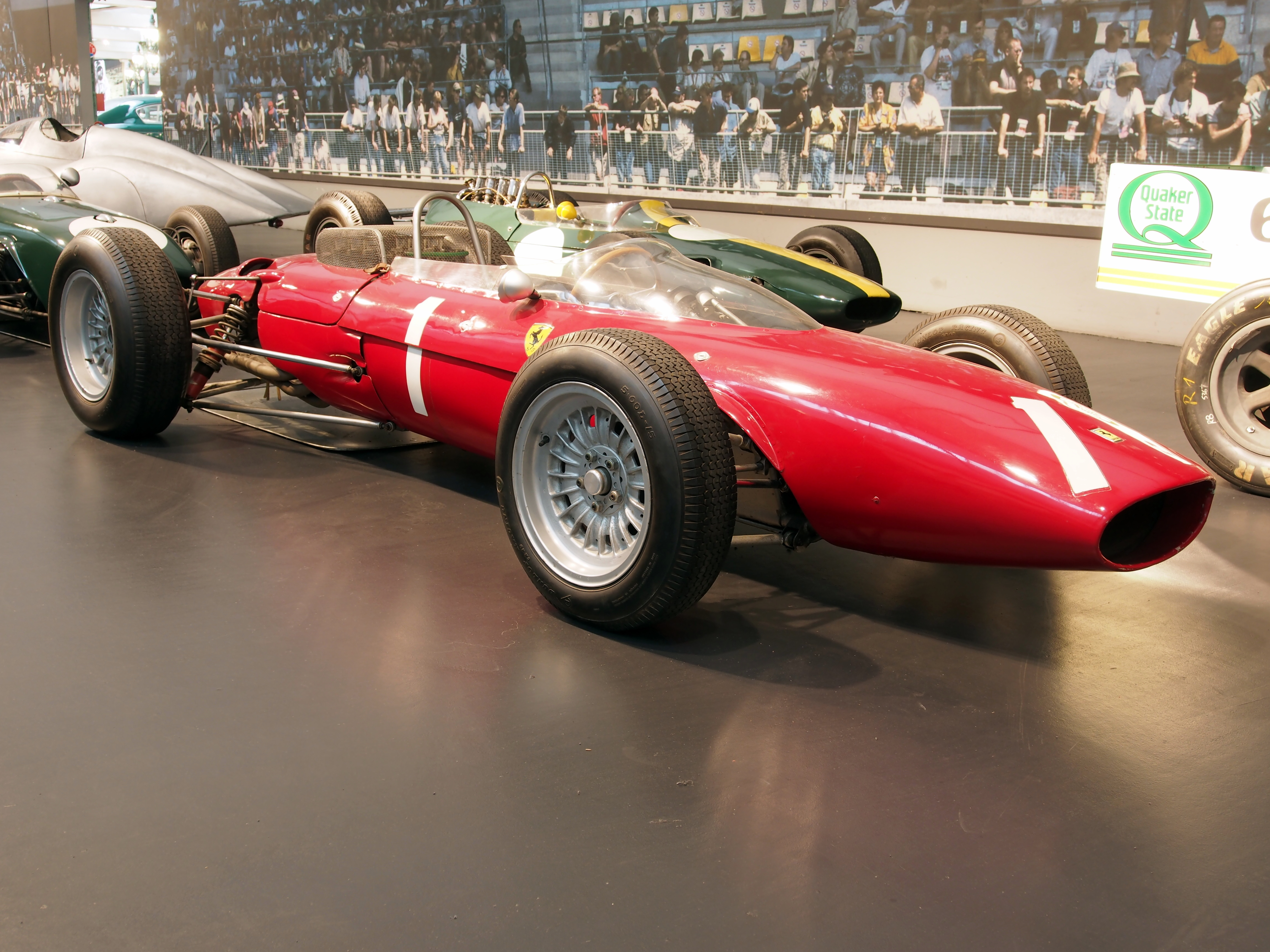 Photographed at the Cité de l’Automobile, Musée national de l’automobile, Collection Schlumpf, Mulhouse, France.